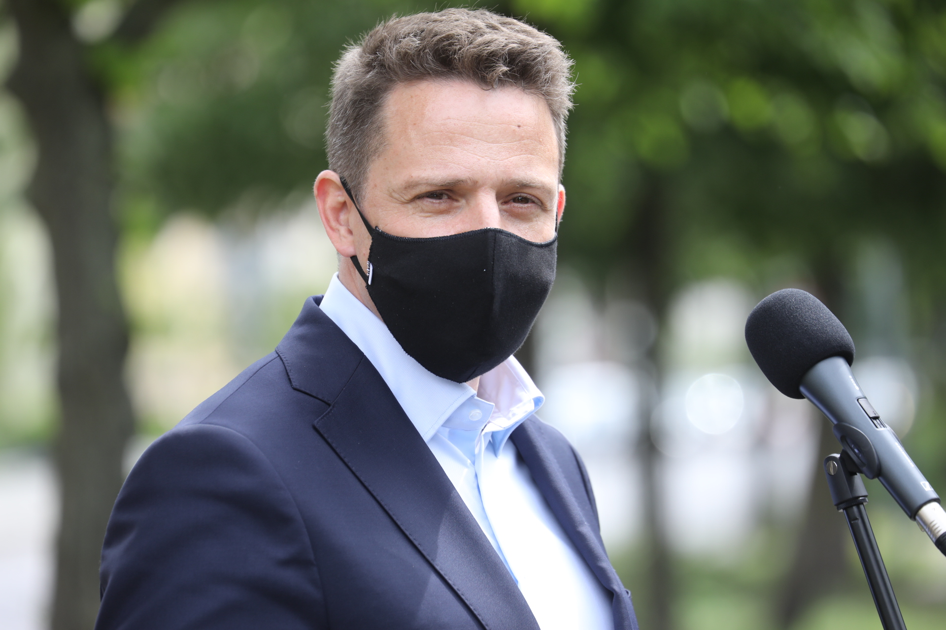 Rafał Trzaskowski, candidate de la Plate-forme civique à l'élection présidentielle polonaise de 2020, lors d'un meeting électoral en Poméranie.